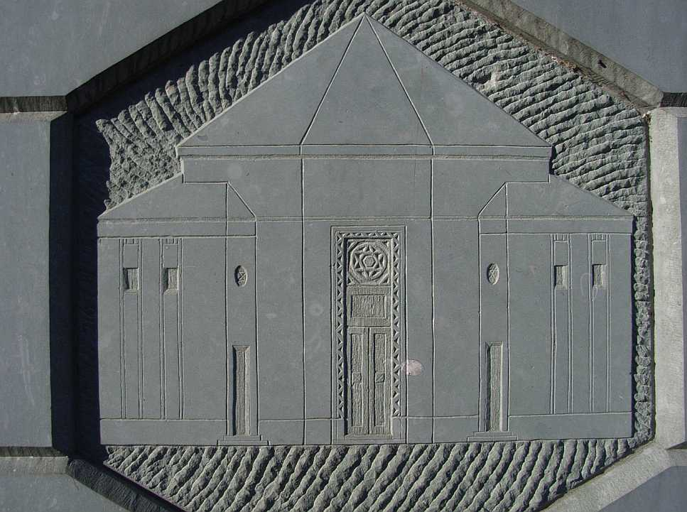 Gedenkstein für die Linnicher Synagoge, Nordpromenade